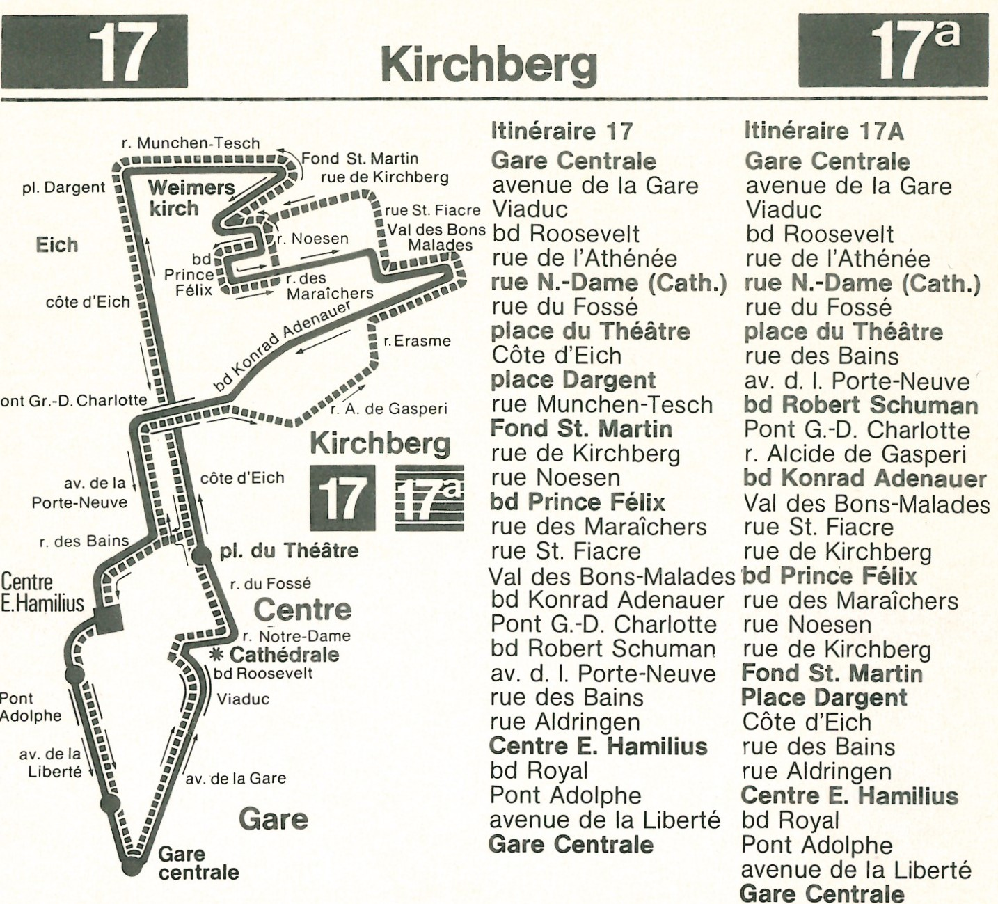 Streck vun den AVL-Linne 17&17A (1987)